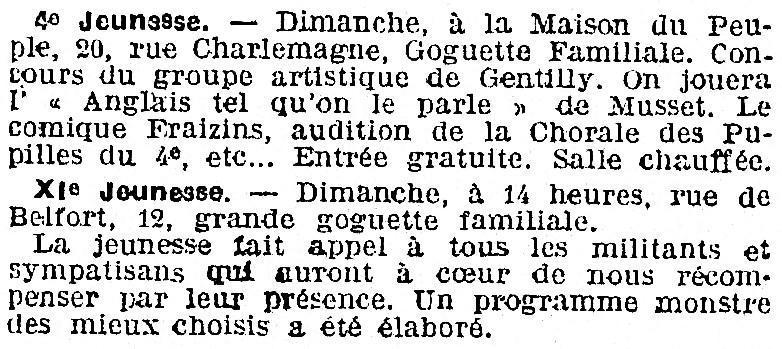 Annonce de réunions de goguettes parisiennes.